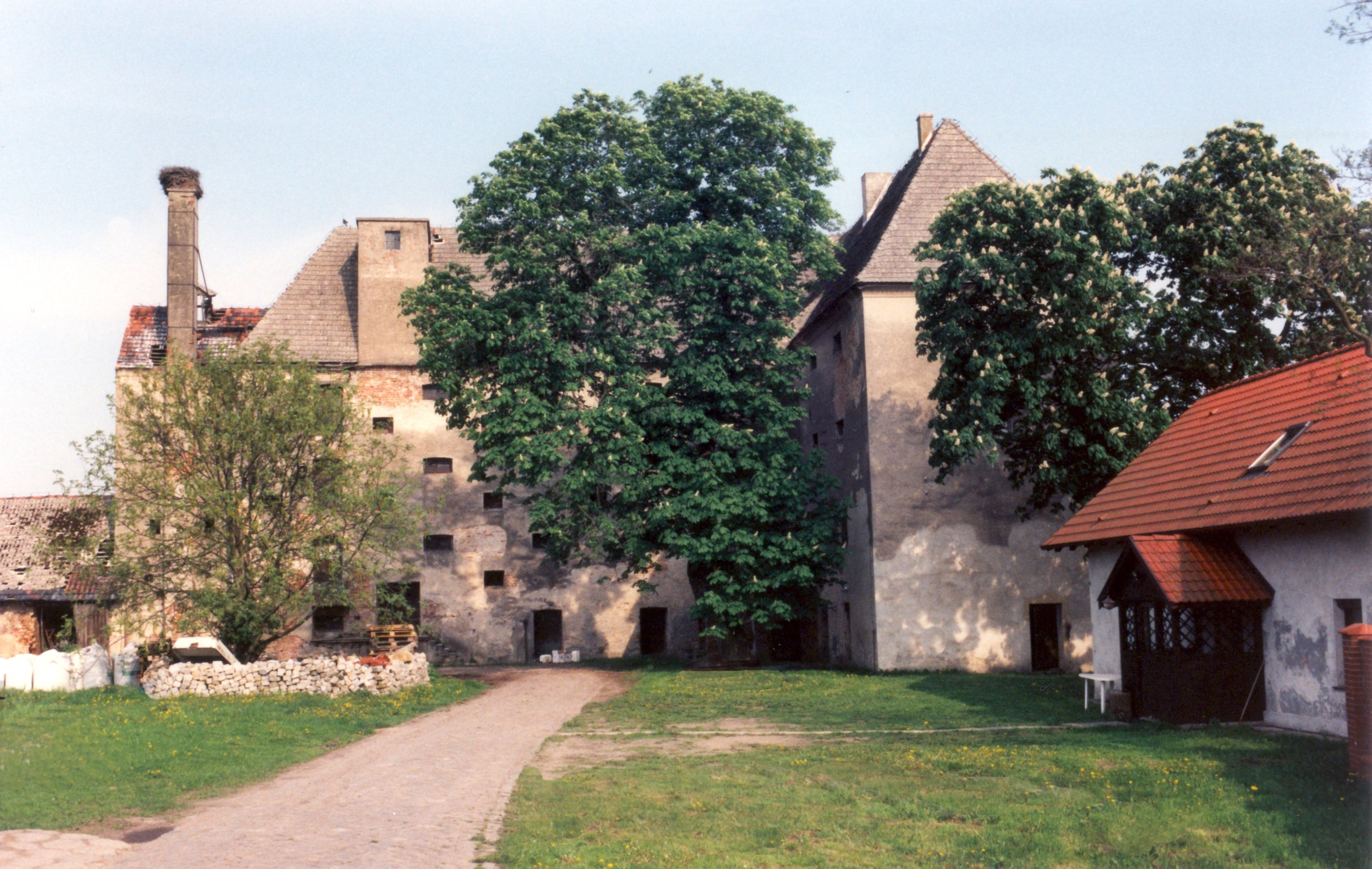 Zimnice Wielkie - spichlerz